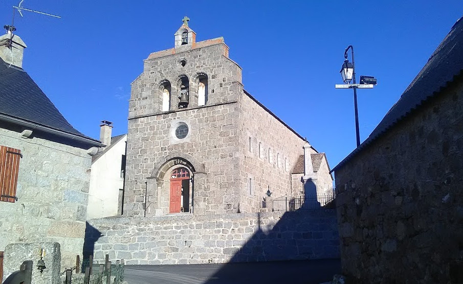 Église de l'Assomption-de-Marie de Malbouzon, commune de Prinsuéjols-Malbouzon, Lozère.